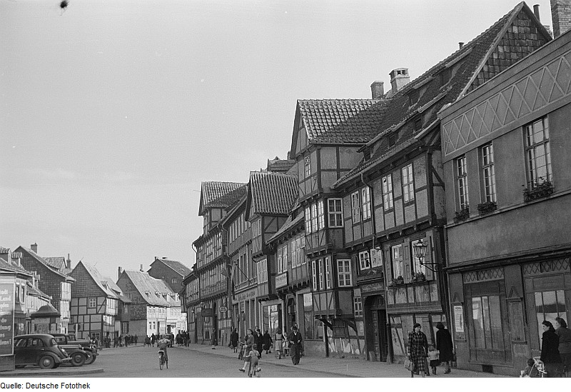 Original image description from the Deutsche Fotothek Markt mit Marktstrasse